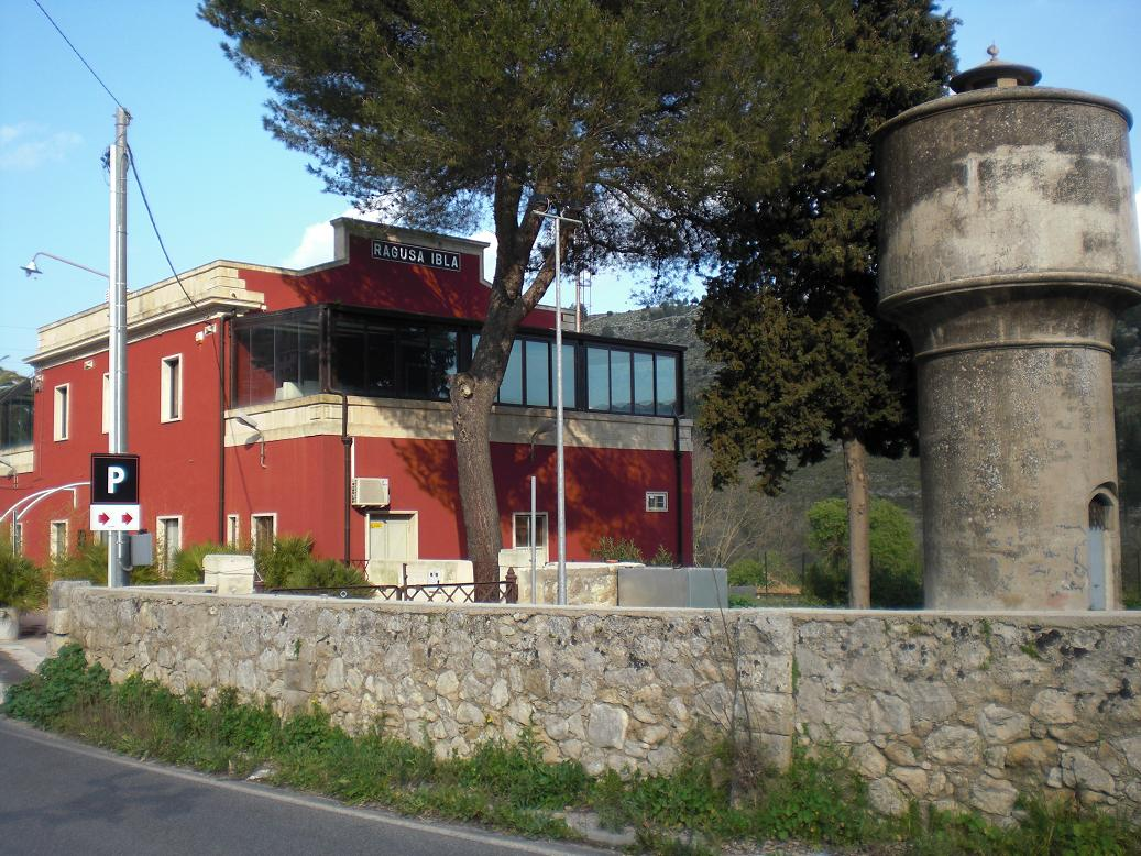 Nuova_torre_acqua della stazione di RG_Ibla sul lato sud. Marzo 2009